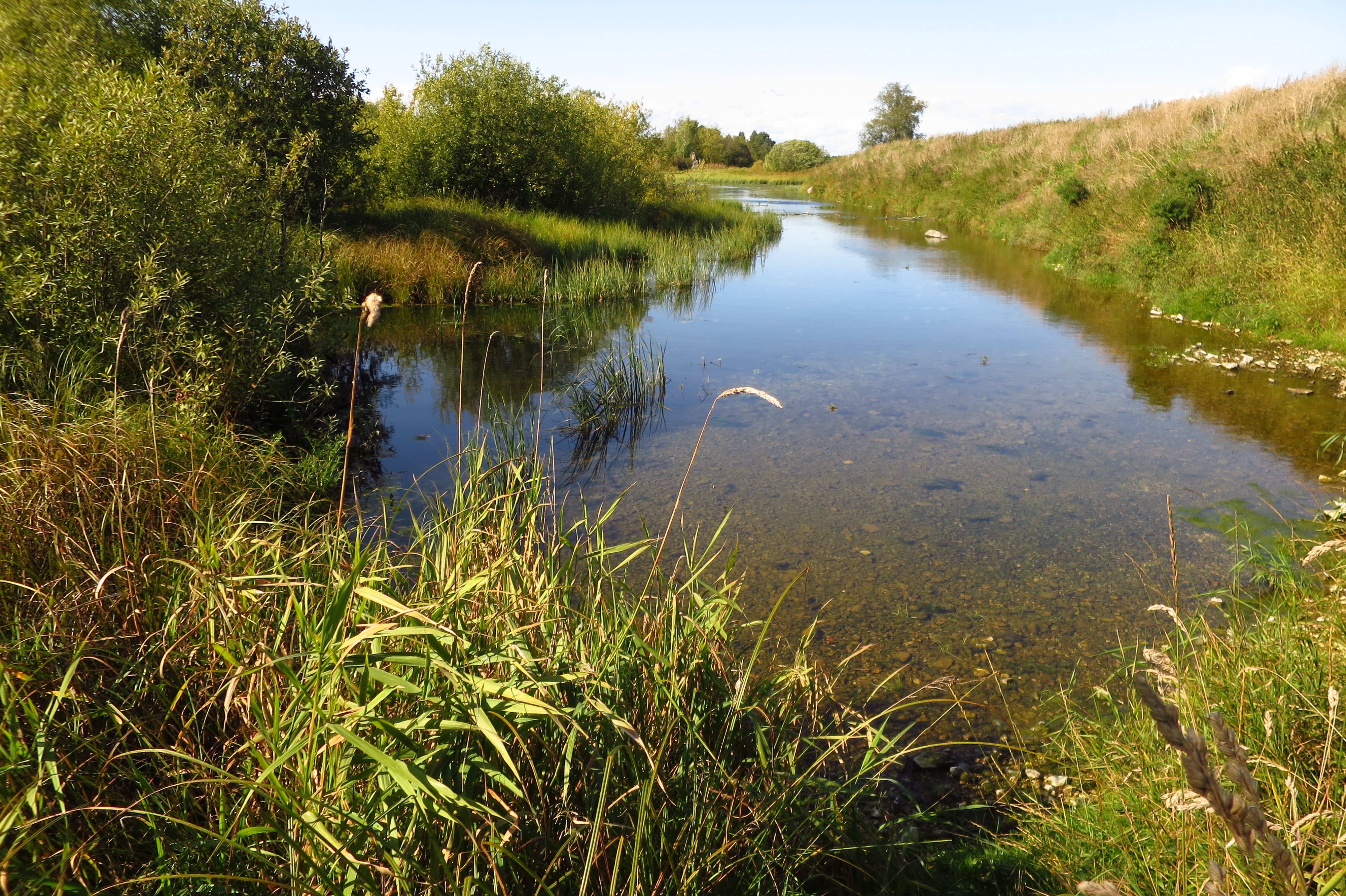 Valgma järv Lääne-Virumaal